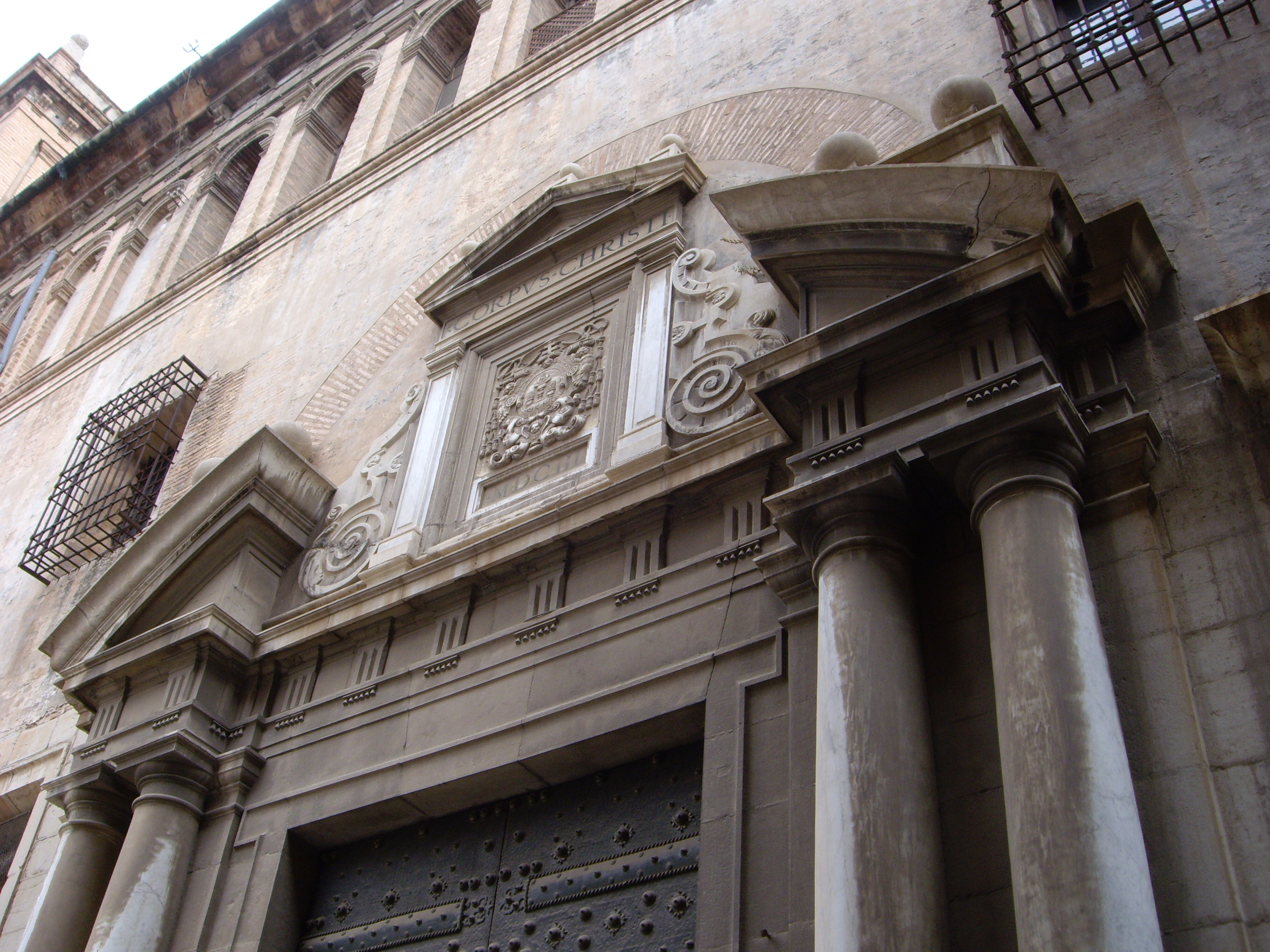 Portada de l'Església